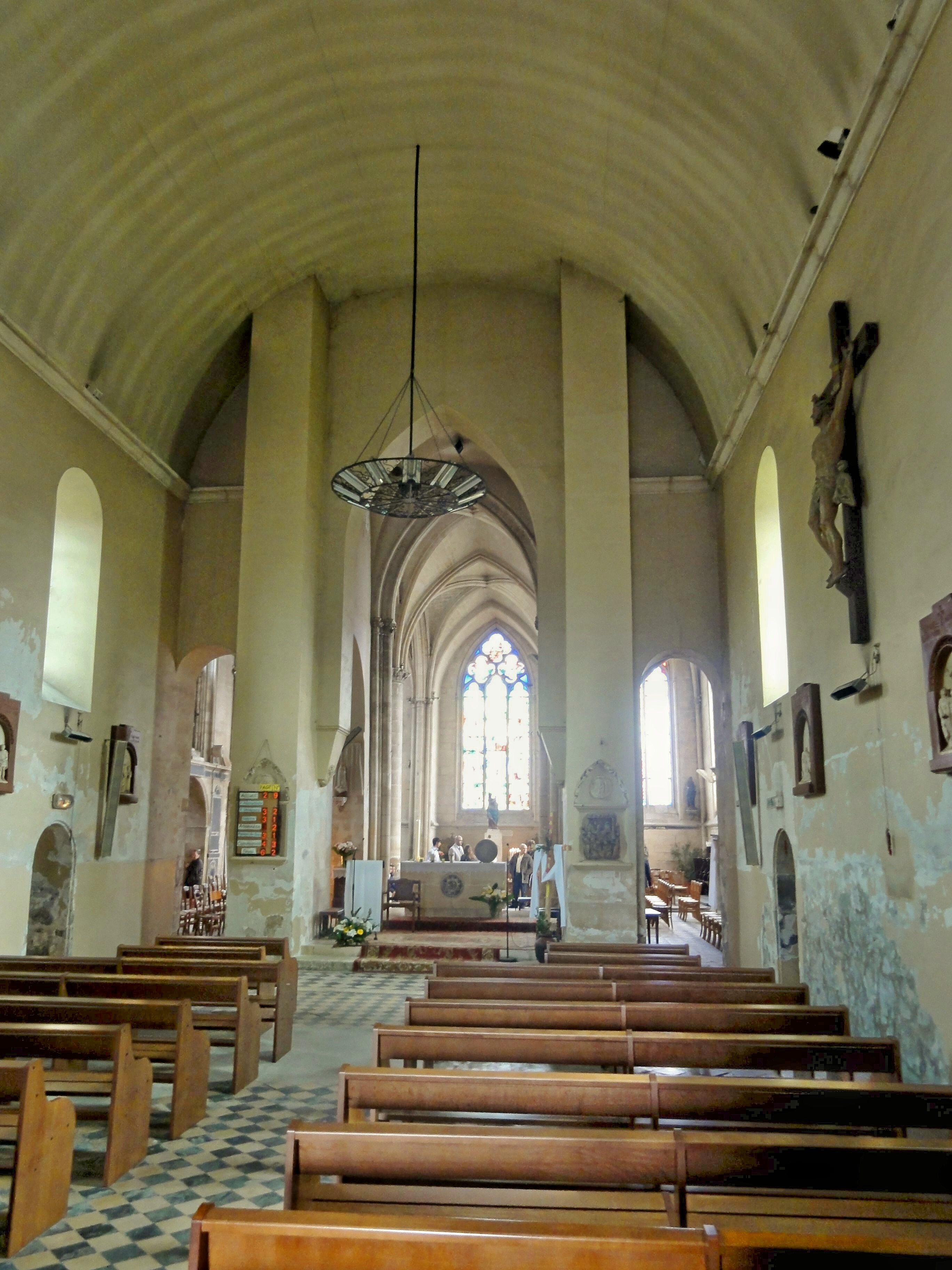 Nef, vue vers la base du clocher.